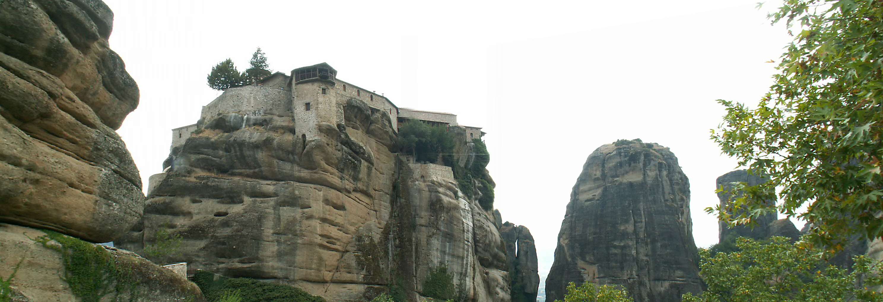 Meteora. Manastirea Varlaam vazuta de la baza stancii pe care se afla